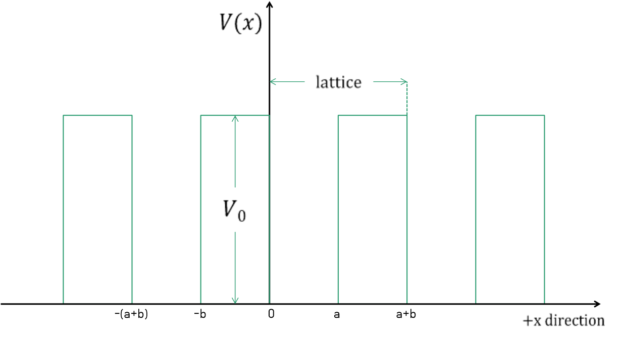 kornig-penney model graphics